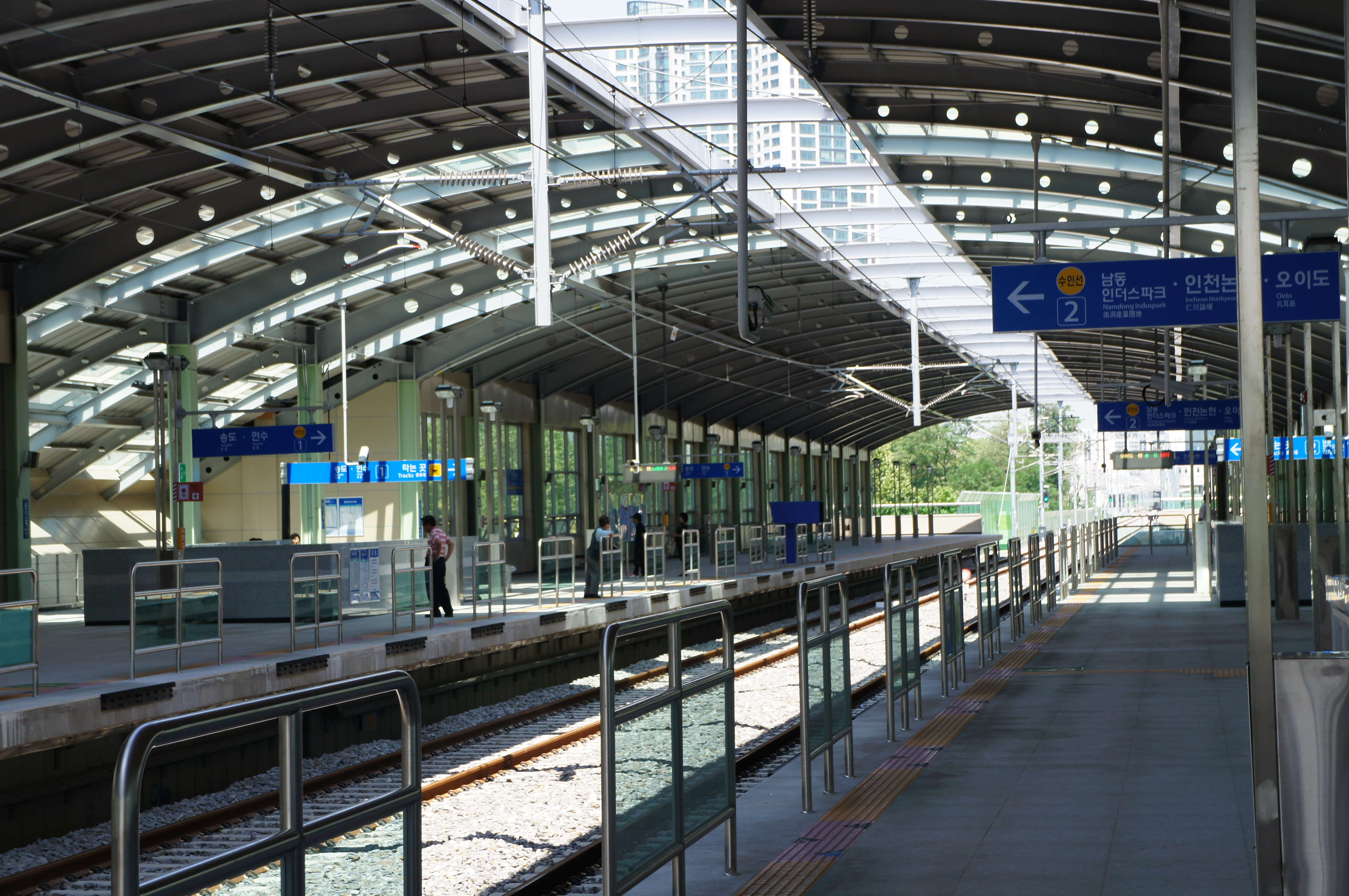 원인재역 역명판